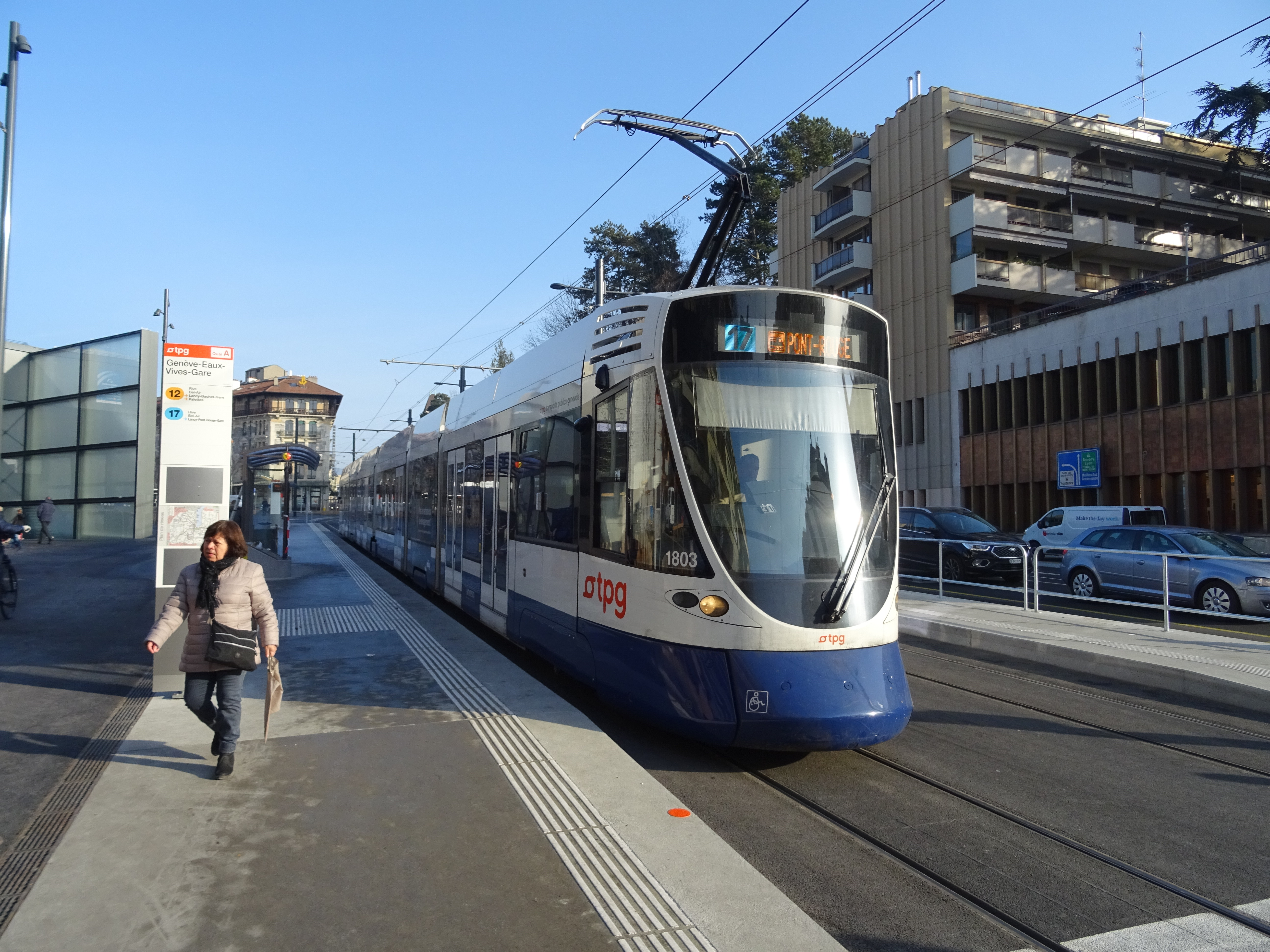 Une rame Stadler Tango du tram 17 à quai à la station Genève-Eaux-Vives-Gare.